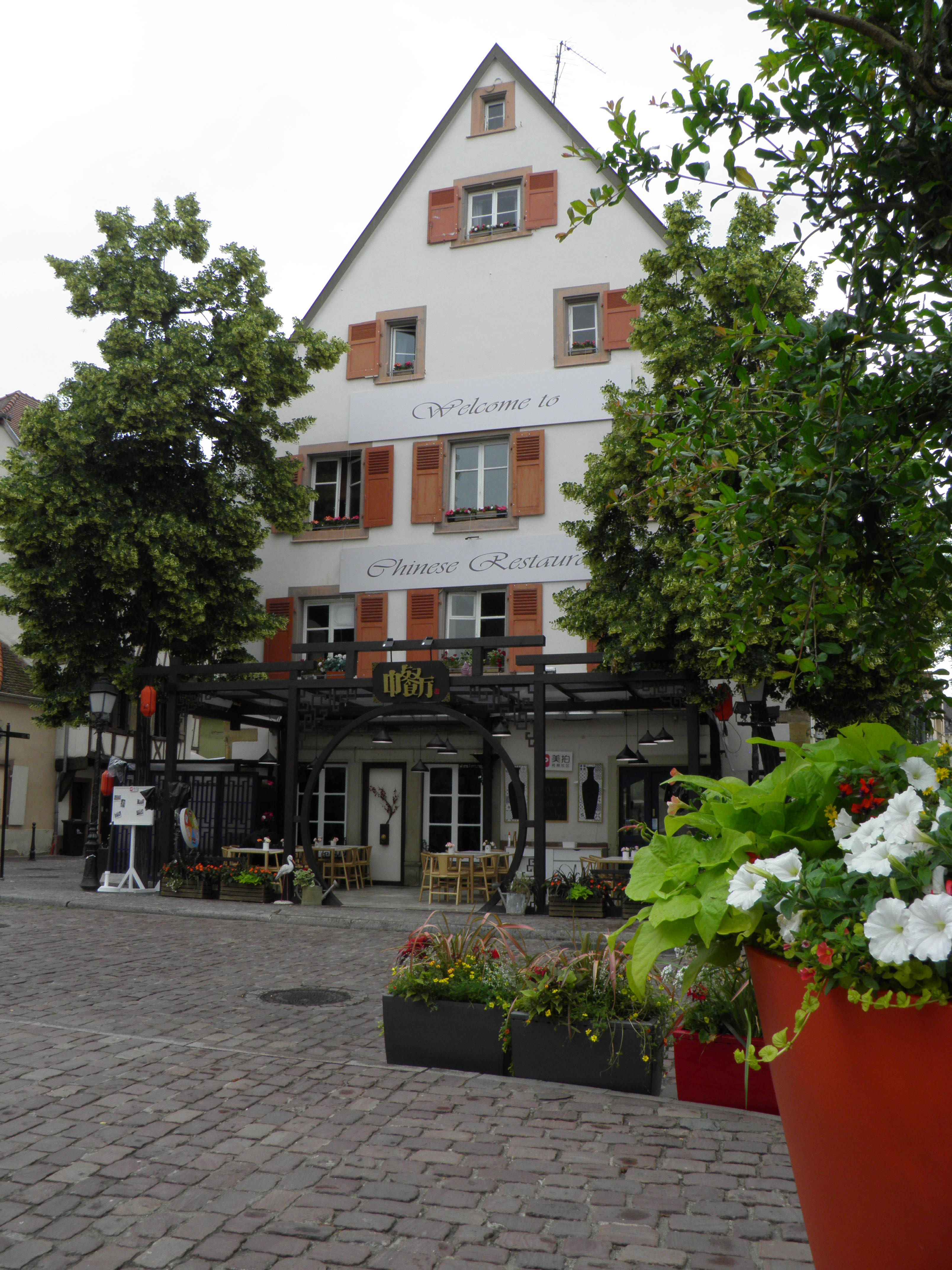 Téléréalité chinoise au restaurant Roesselmann à Colmar (Haut-Rhin, France).